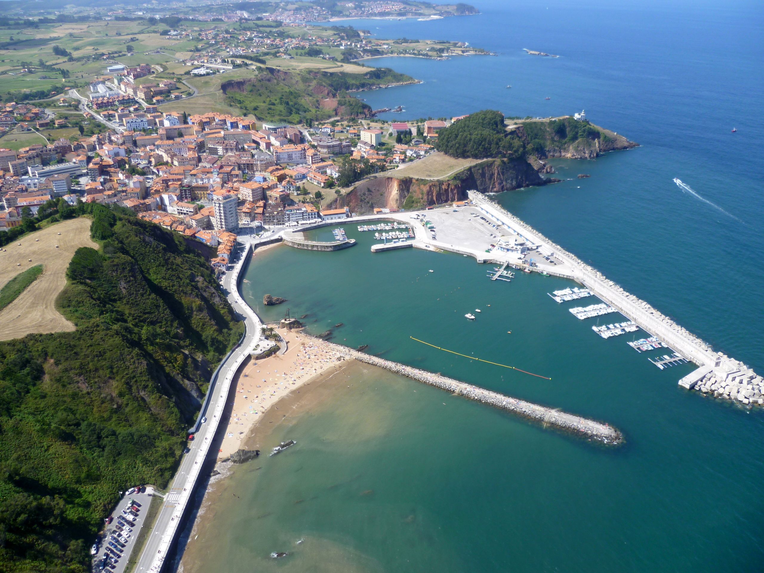 Candás y su puerto.